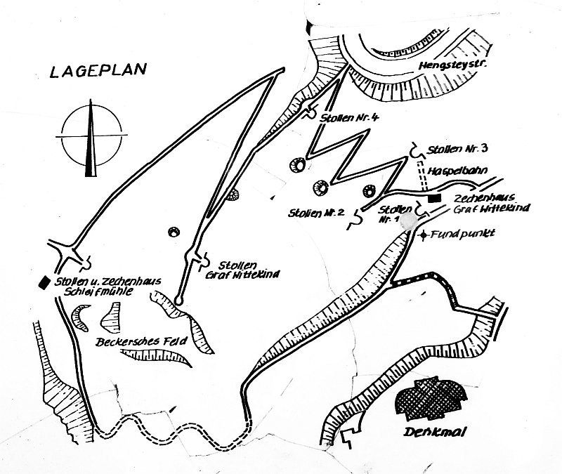 Syburger Bergbauweg, Lageplan vom Hinweistafel abfotografiert